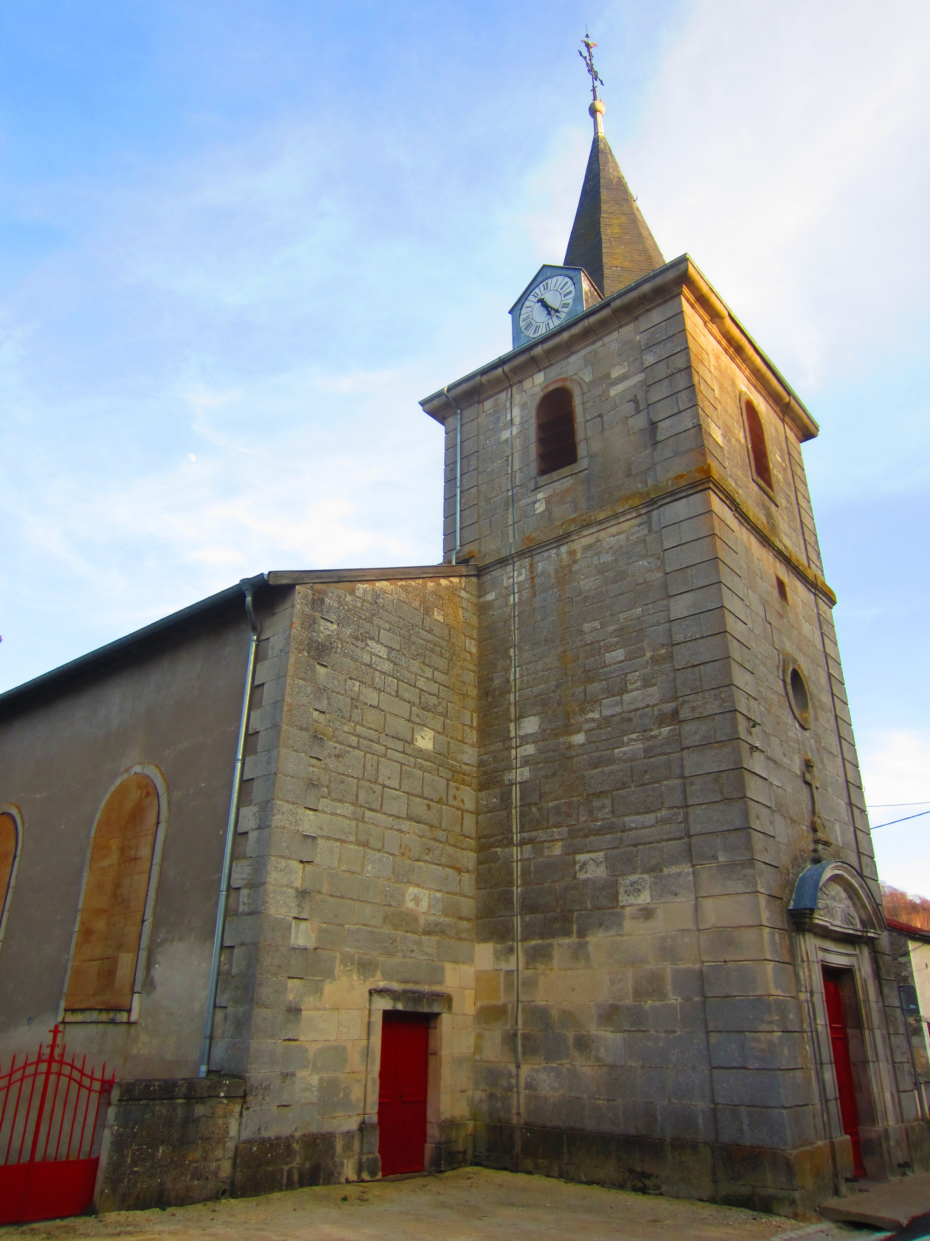 St Maurice Cotes eglise